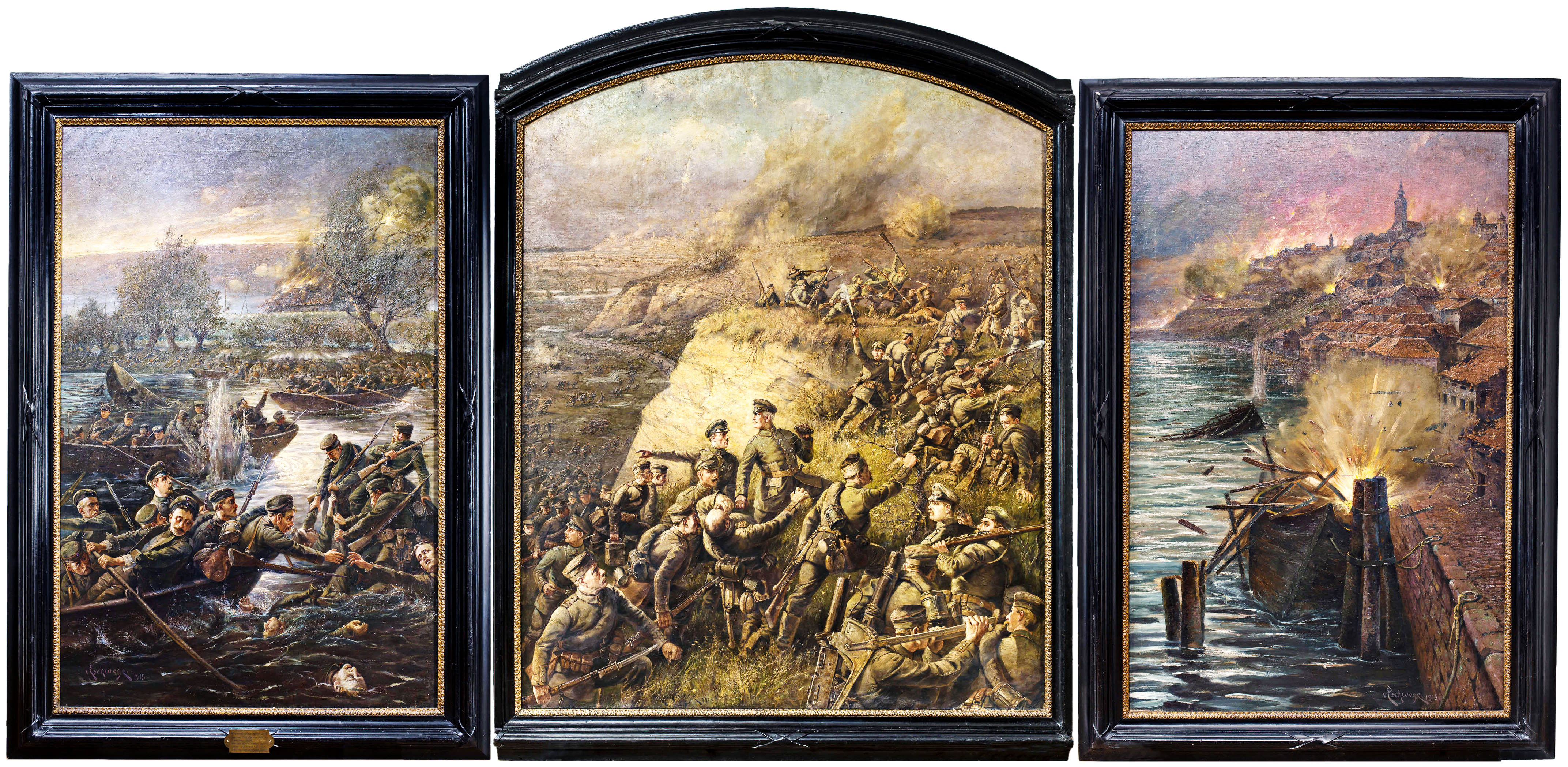 Triptychon von Elmar von Eschwege (1856–1935) aus dem Jahre 1915. Es zeigt den „Übergang über die Save bei Belgrad“ des Reserve-Infanterie-Regiments Nr. 208 im selben Jahr.